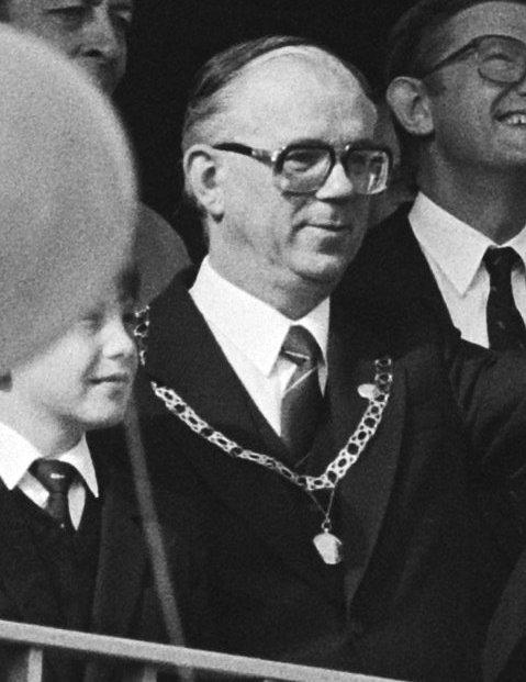 Collectie / Archief : Fotocollectie Anefo Reportage / Serie : [ onbekend ] Beschrijving : Koninginnedag 1985, Anna Paulowna ; Koninklijk bezoek op balkon van het gemeentehuis Datum : 30 april 1985 Trefwoorden : KONINGINNEDAG Persoonsnaam : Anna Paulowna Fotograaf : Croes, Rob C. / Anefo Auteursrechthebbende : Nationaal Archief Materiaalsoort : Negatief (zwart/wit) Nummer archiefinventaris : bekijk toegang 2.24.01.05 Bestanddeelnummer : 933-3102